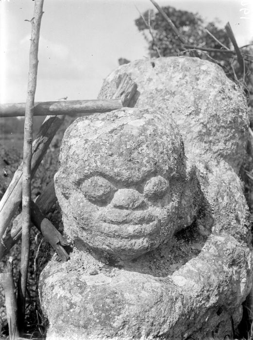 Negatif. Salah satu batu besar (megalit) di Tegurwangi Lama, Kota Pagaralam.